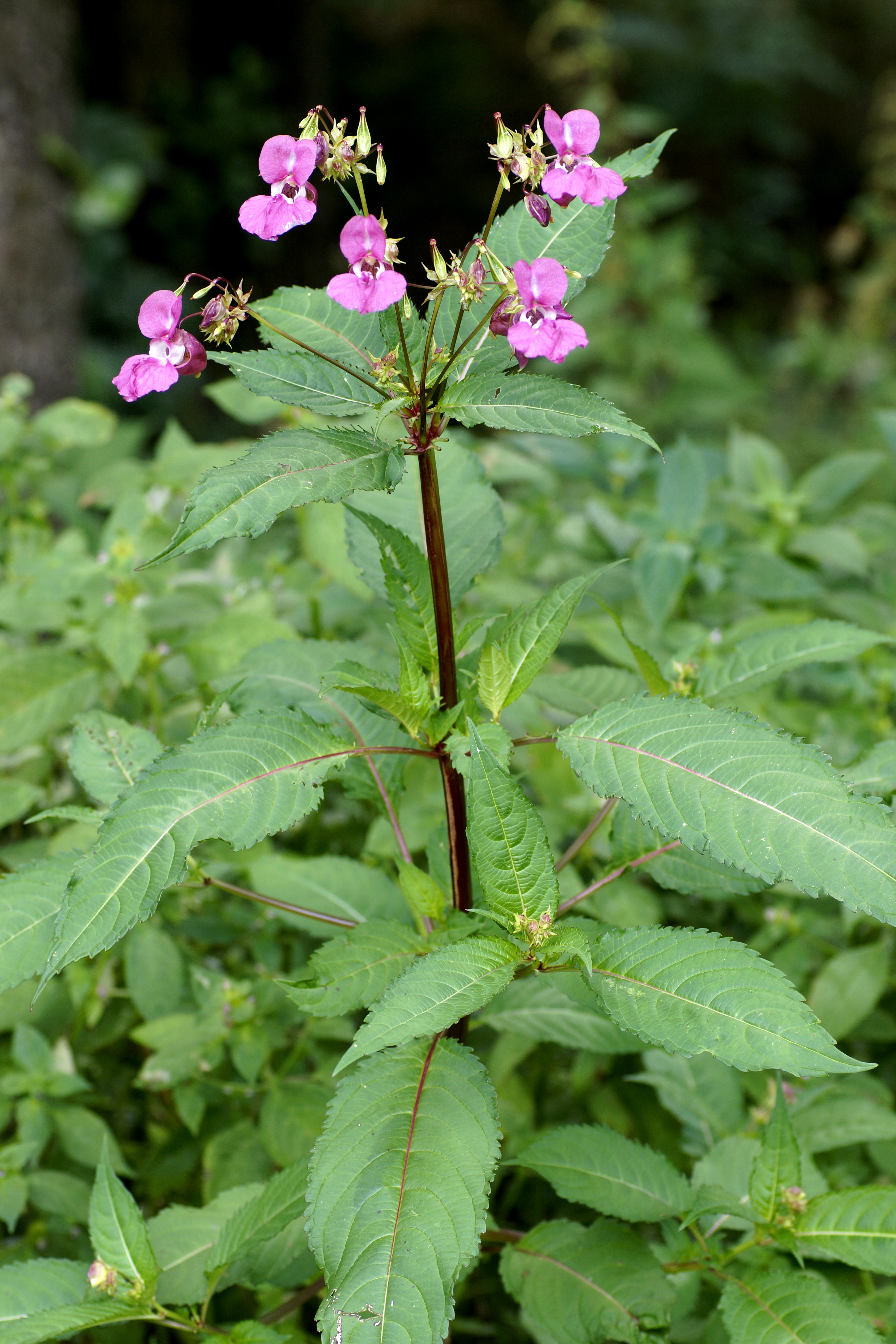 Drüsiges Springkraut, Balsaminaceae, Deutschland, Bayern, Oberfranken, Selbitz Foto: U.Schmidt, 30.VII.2012